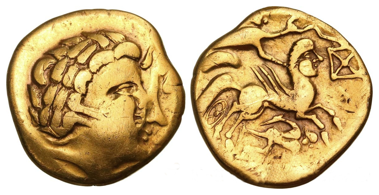 Statère en or des Cénomans ou Aulerques-Cénomans (région du Mans, France). Avers : Tête à droite, les cheveux coiffés en mèches tirées en arrière tombant sur le cou. Revers : Cheval androcéphale galopant à droite, conduit par un aurige tenant devant lui un étendard (?), derrière, une de roue, sous le cheval, personnage couché à droite, tenant deux objets ovoïdes. Diamètre 21 mm, poids 7,21 g. L'avers présente un défaut de frappe (tréflage). Ce statère est semblable à ceux (les plus nombreux, 118 ex.) de la découverte du dépôt des Sablons (Le Mans) (cf: Trésors monétaires XXIV, BnF, 2011)